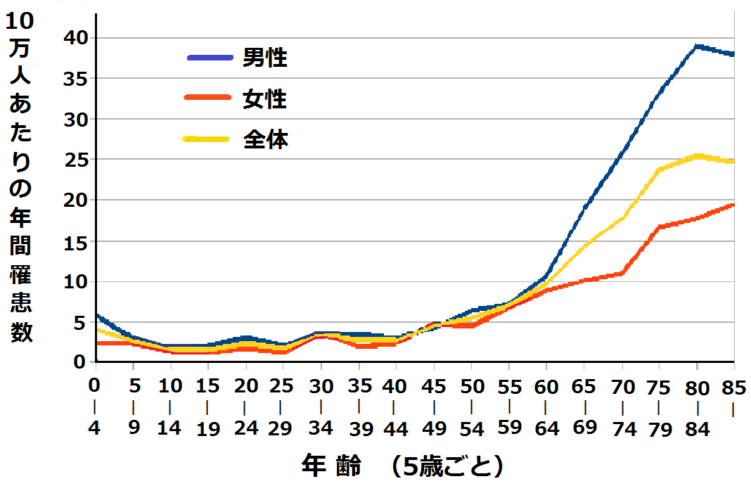 日本における年齢別性別白血病発症率 2005年